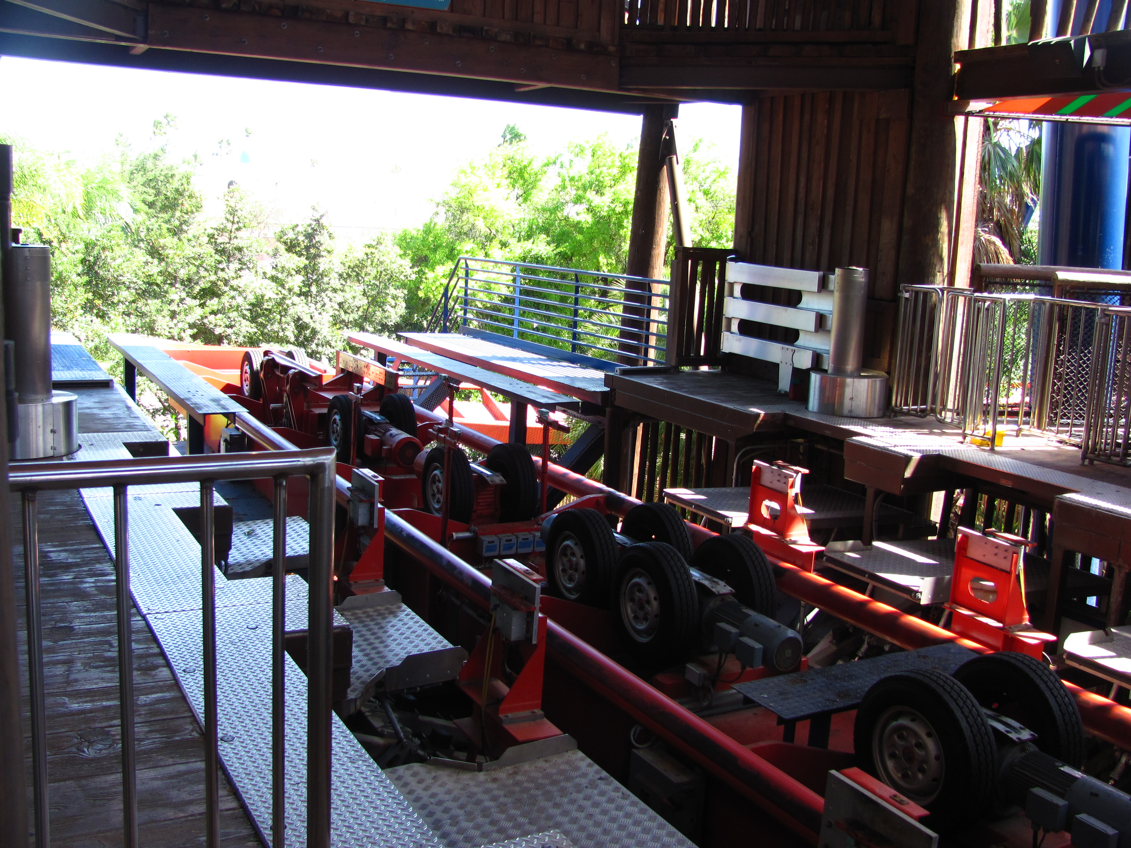 SheiKra